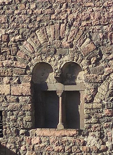 Römerstraße 44 Worms, romanisches Erdgeschoßfenster